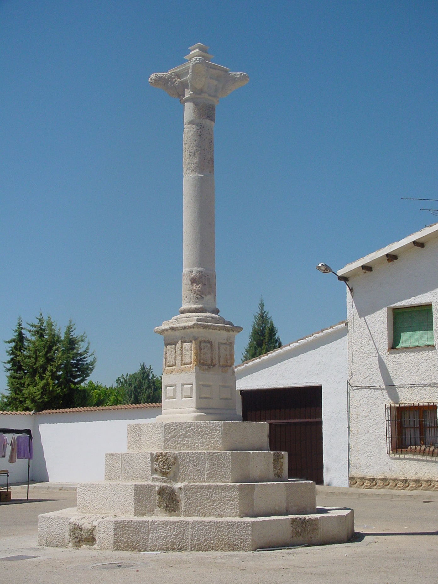 La Picota de Pezuela de las Torres.